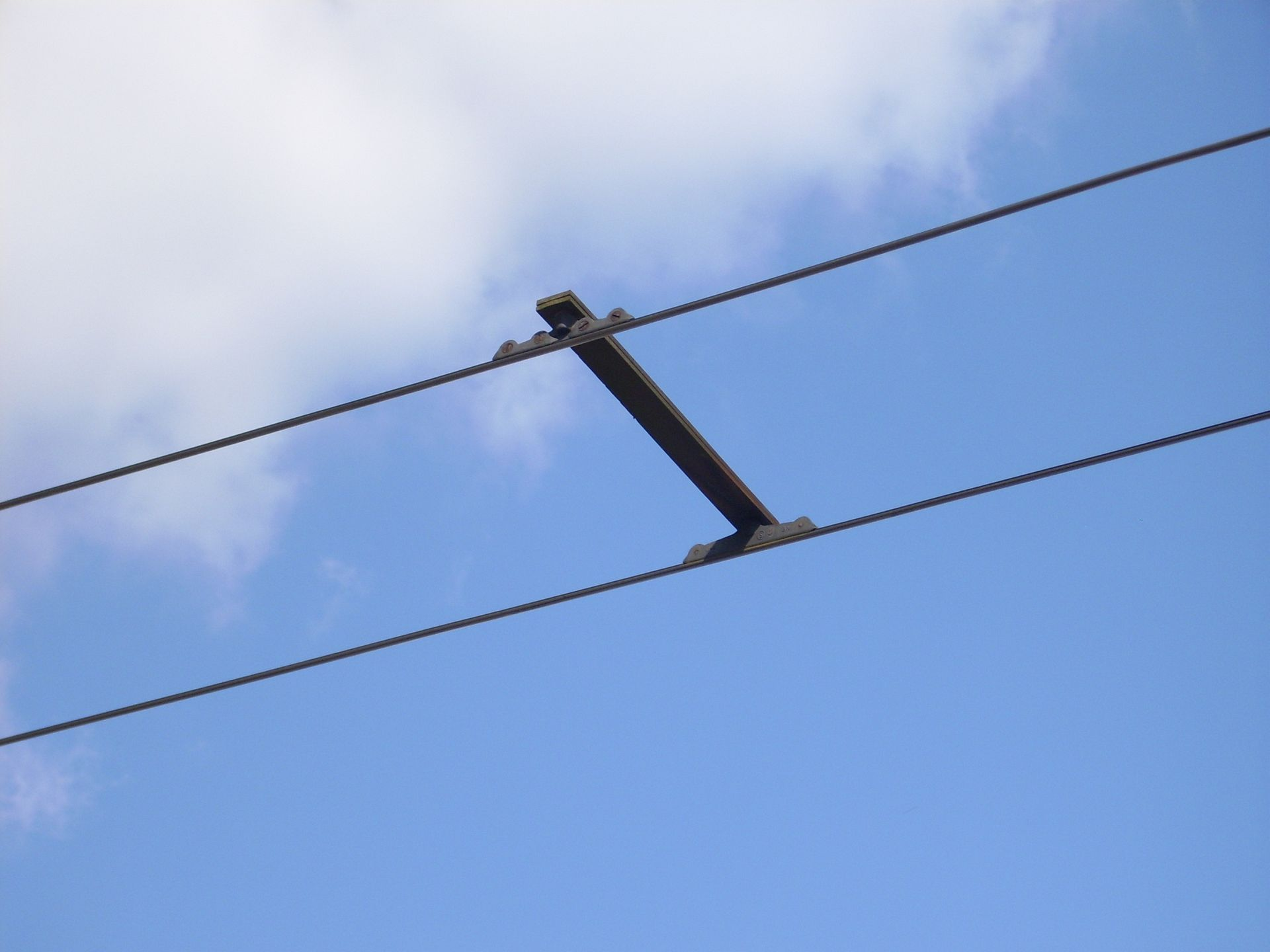 Lublin (Polska). Poprzeczka izolacyjna łącząca przewody trolejbusowej sieci trakcyjnej.